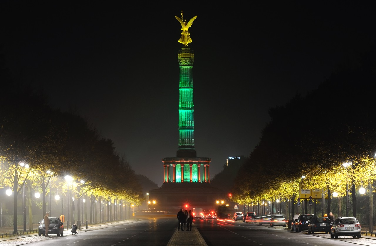 Siegessäule/Victory Column at Berlin Tiergarten